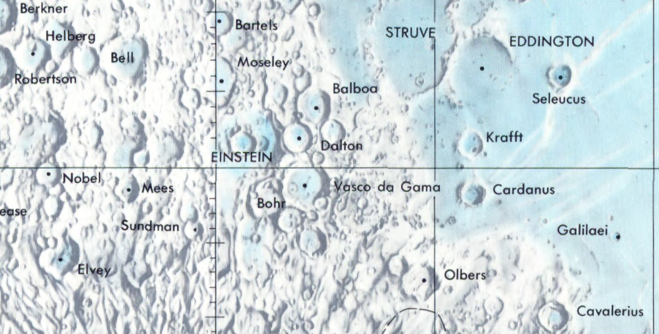 Cráter lunar . Localización. (Lunar Chart LPC1. Second Edition)